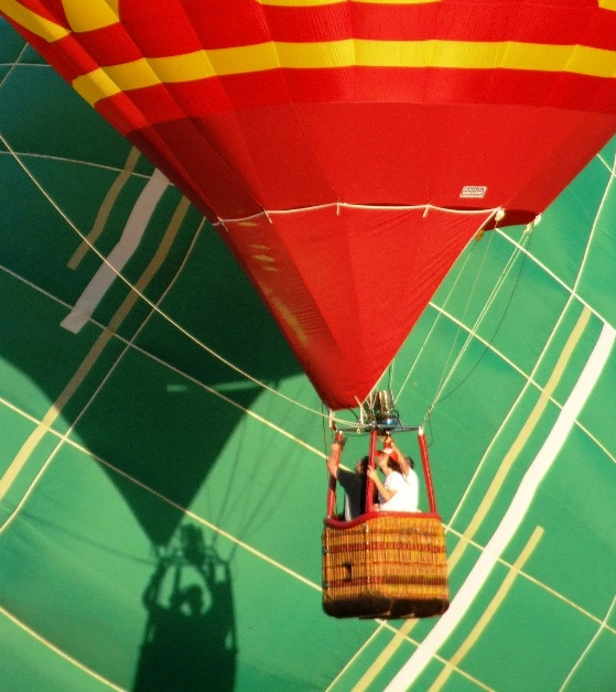 C'est la nacelle qui confère le côté pittoresque commun à chaque envolée...